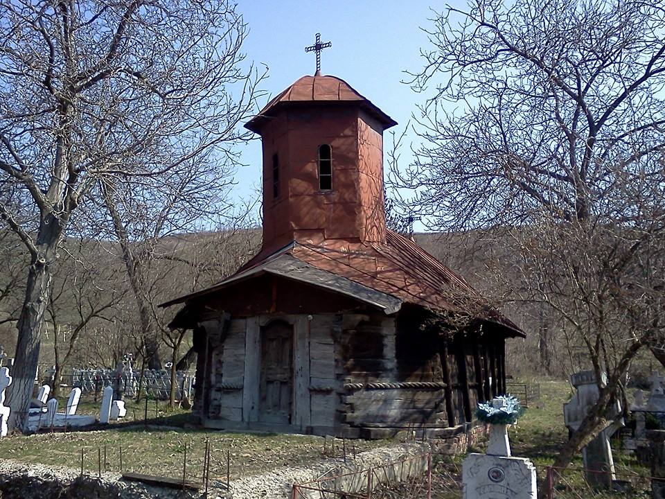 Biserica de lemn „Nașterea Maicii Domnului”